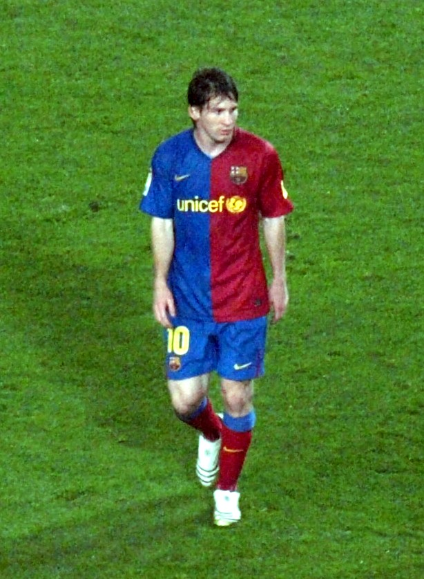 Messi ante el Almeria en el Nou Camp en el partido de la primera vuelta de La Liga 2008-09